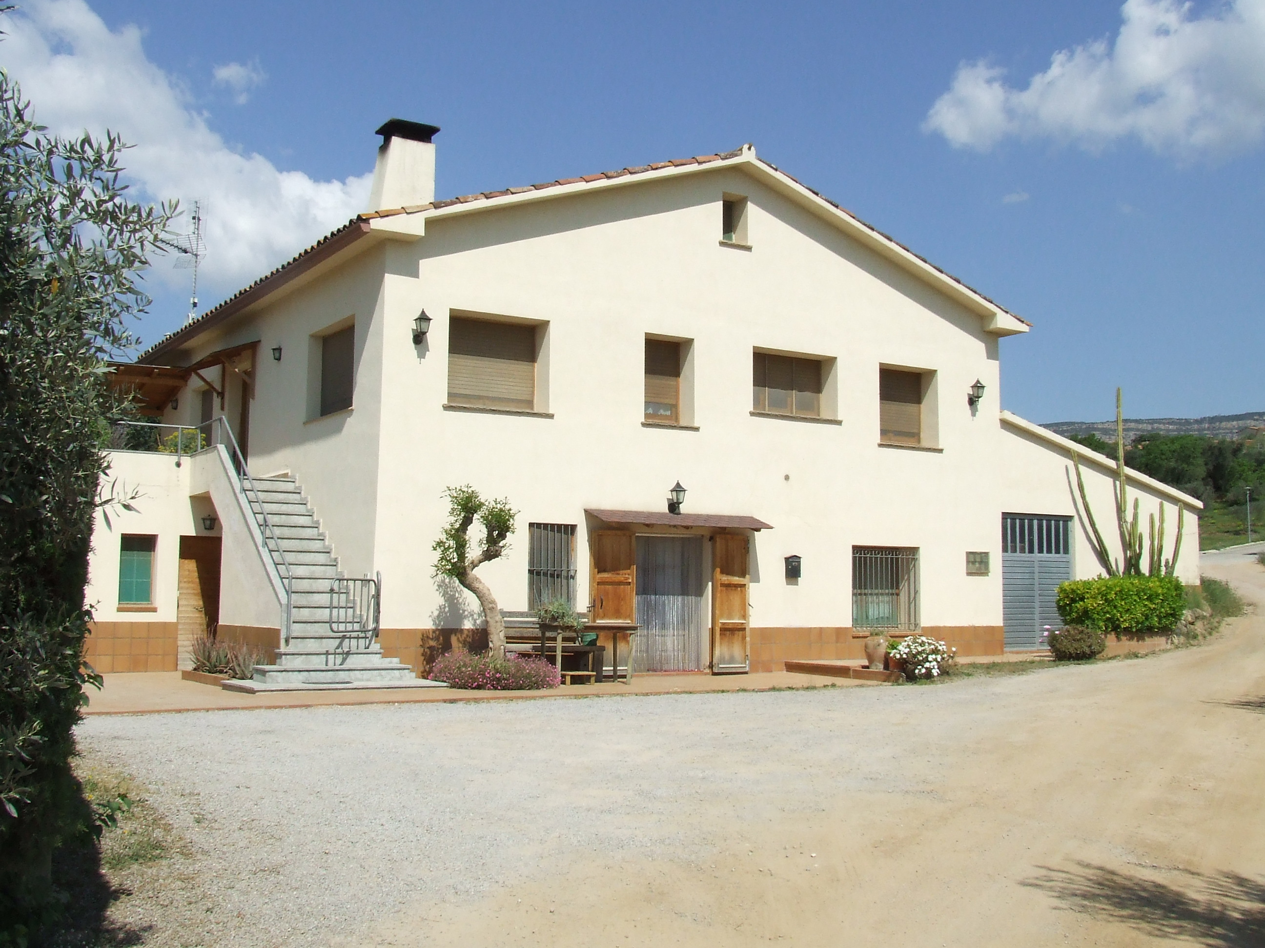 Can Garrigó (la Parròquia de Bigues, Bigues i Riells, Vallès Oriental)